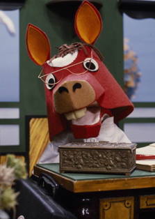 Meindert het Paard uit de Fabeltjeskrant